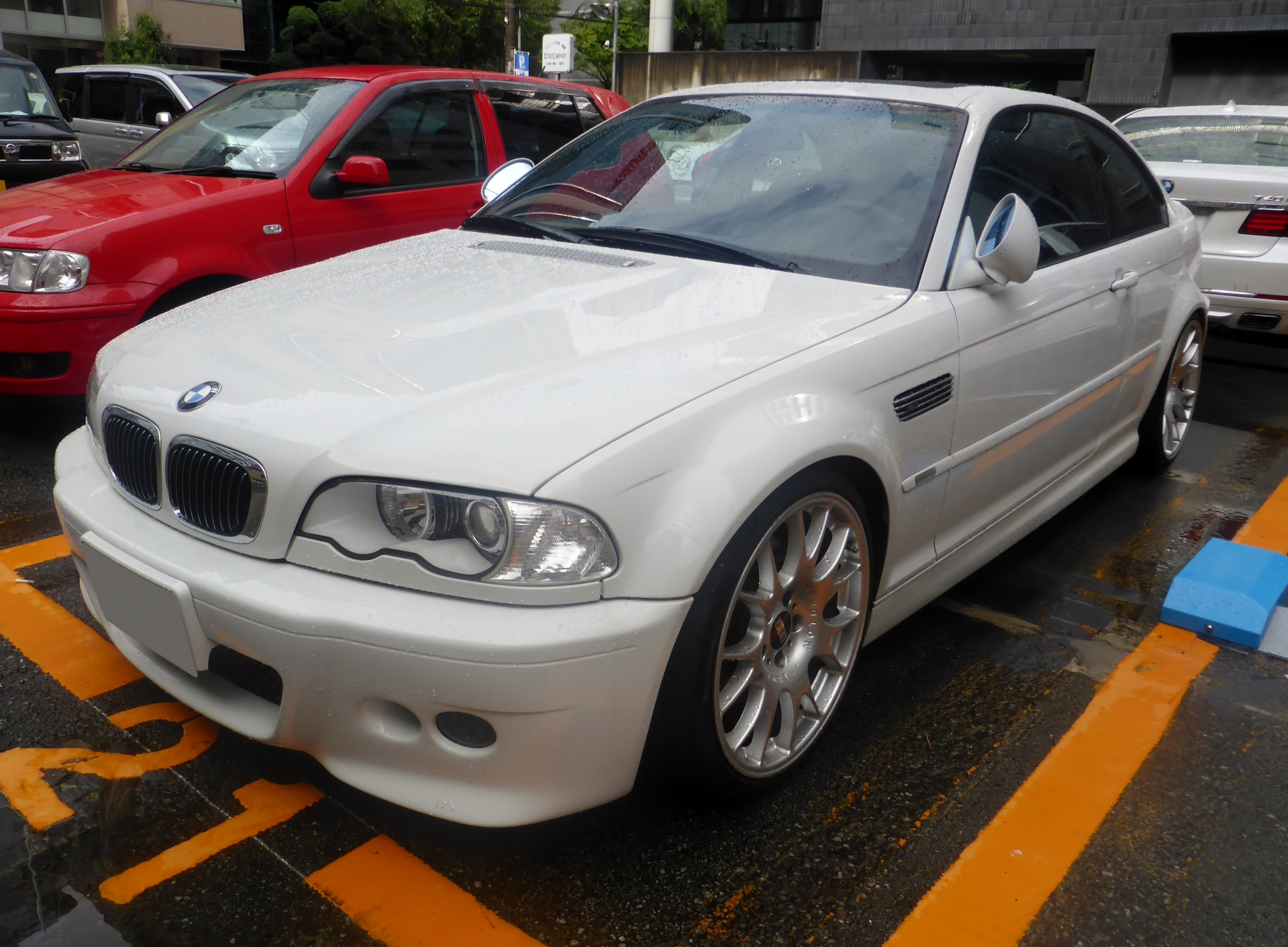 E46型BMW・M3 をフロントから撮影。